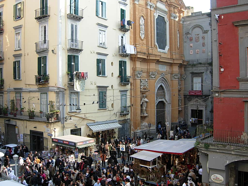 Piazza San Gaetano in Napoli Foto personale